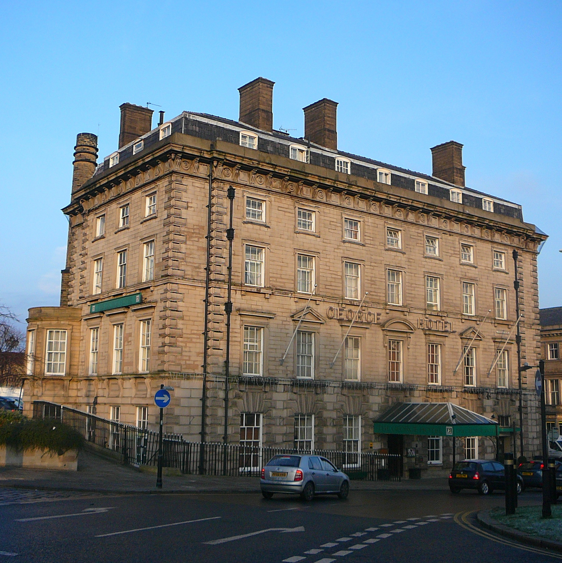 George Hotel, Huddersfield